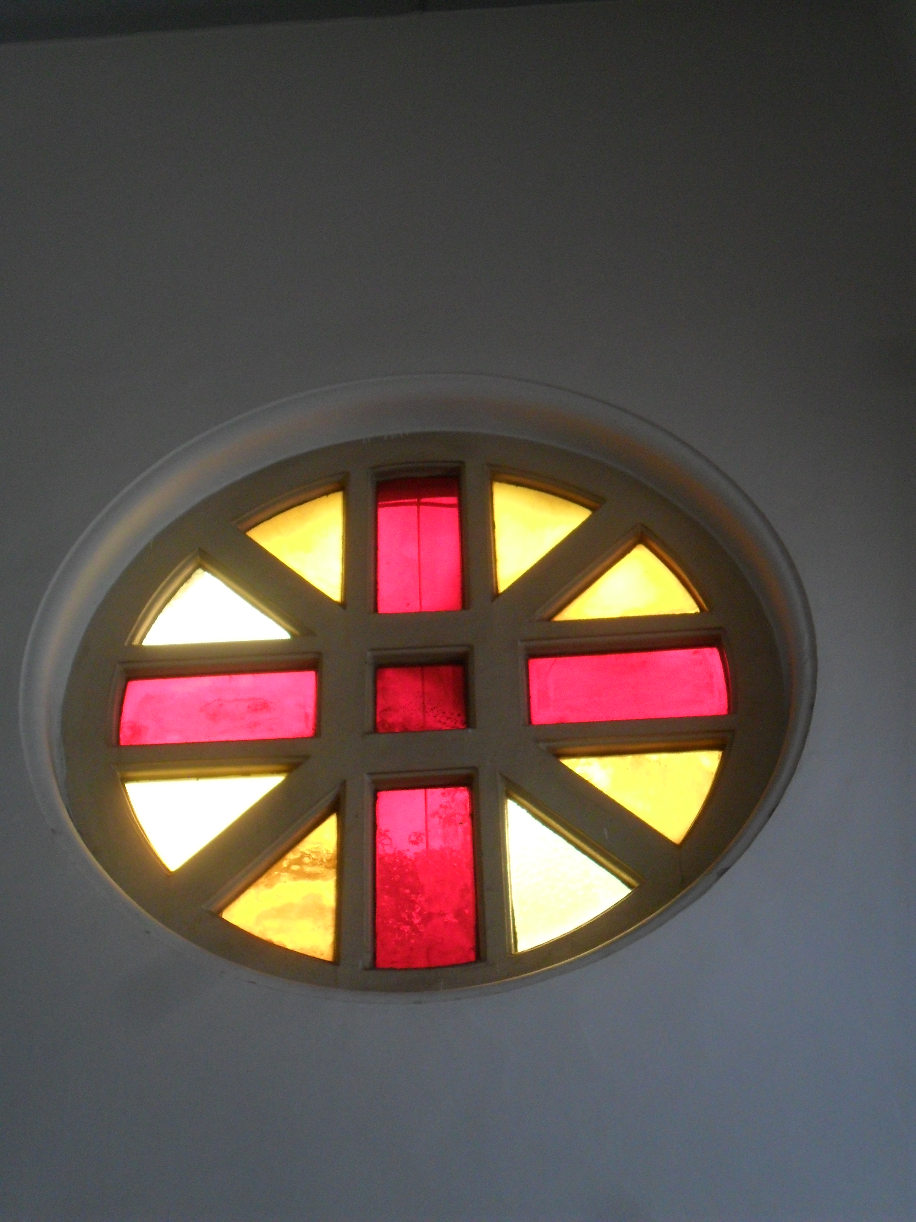 中文（香港）: 聖德肋撒堂, 香港, 中國